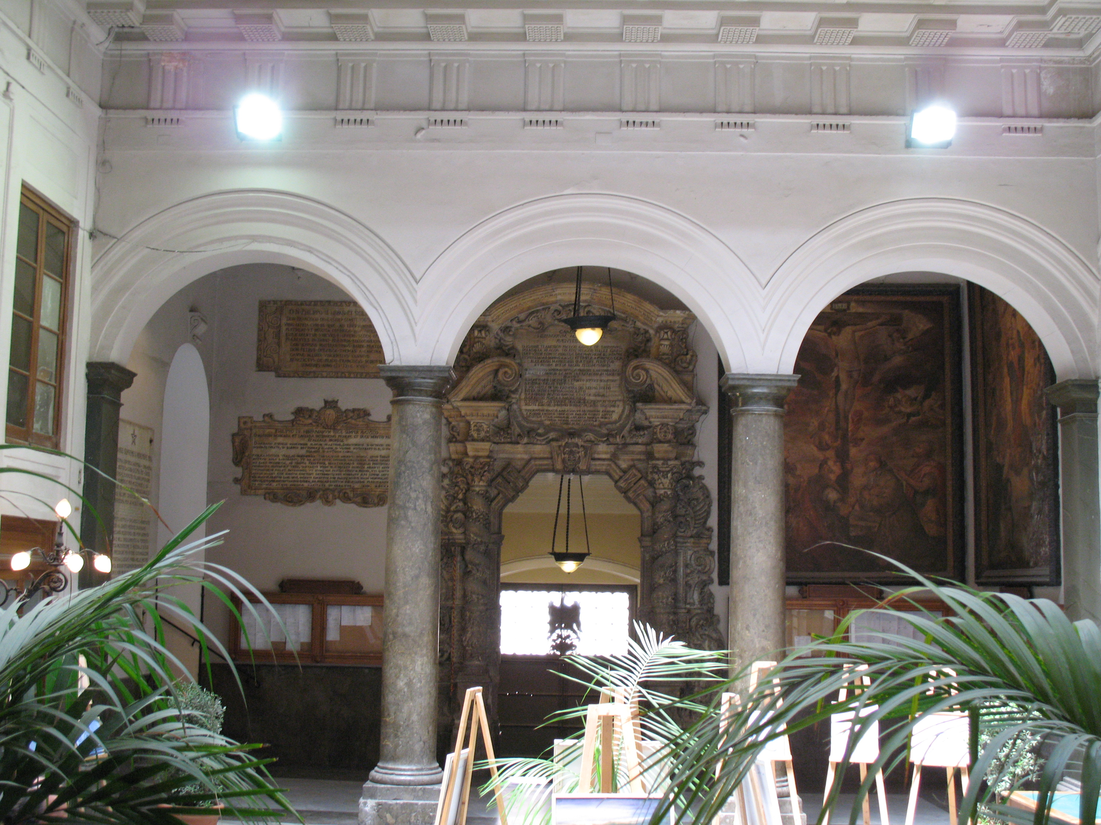 Cortile interno del Palazzo Pretorio di Palermo